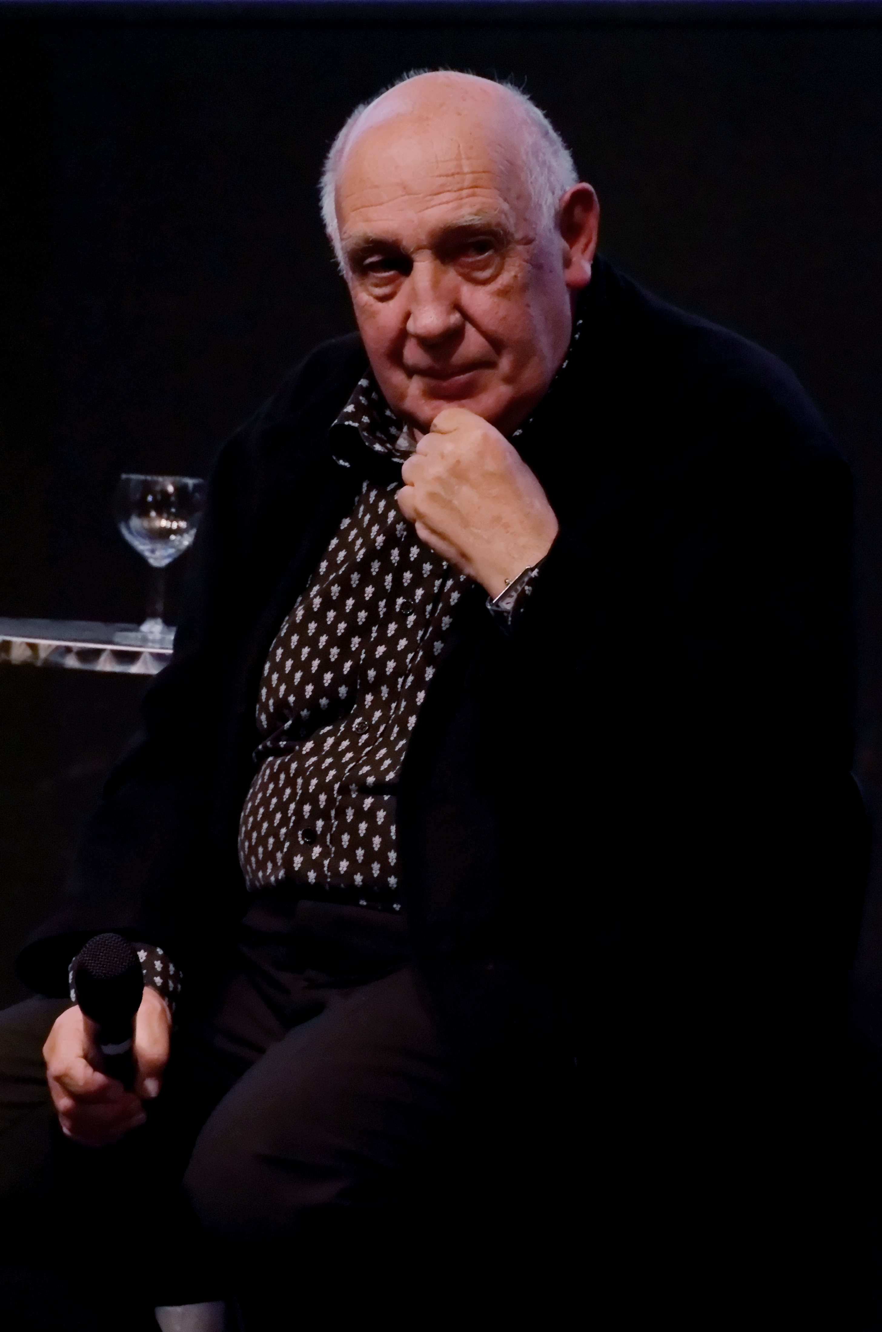 Raymond Depardon lors de la présentation de Journal de France, 20' rencontres du cinéma francophone en Beaujolais. Cinéma les 400 coups, Espace Barmondière 69400 Villefranche-sur-Saône